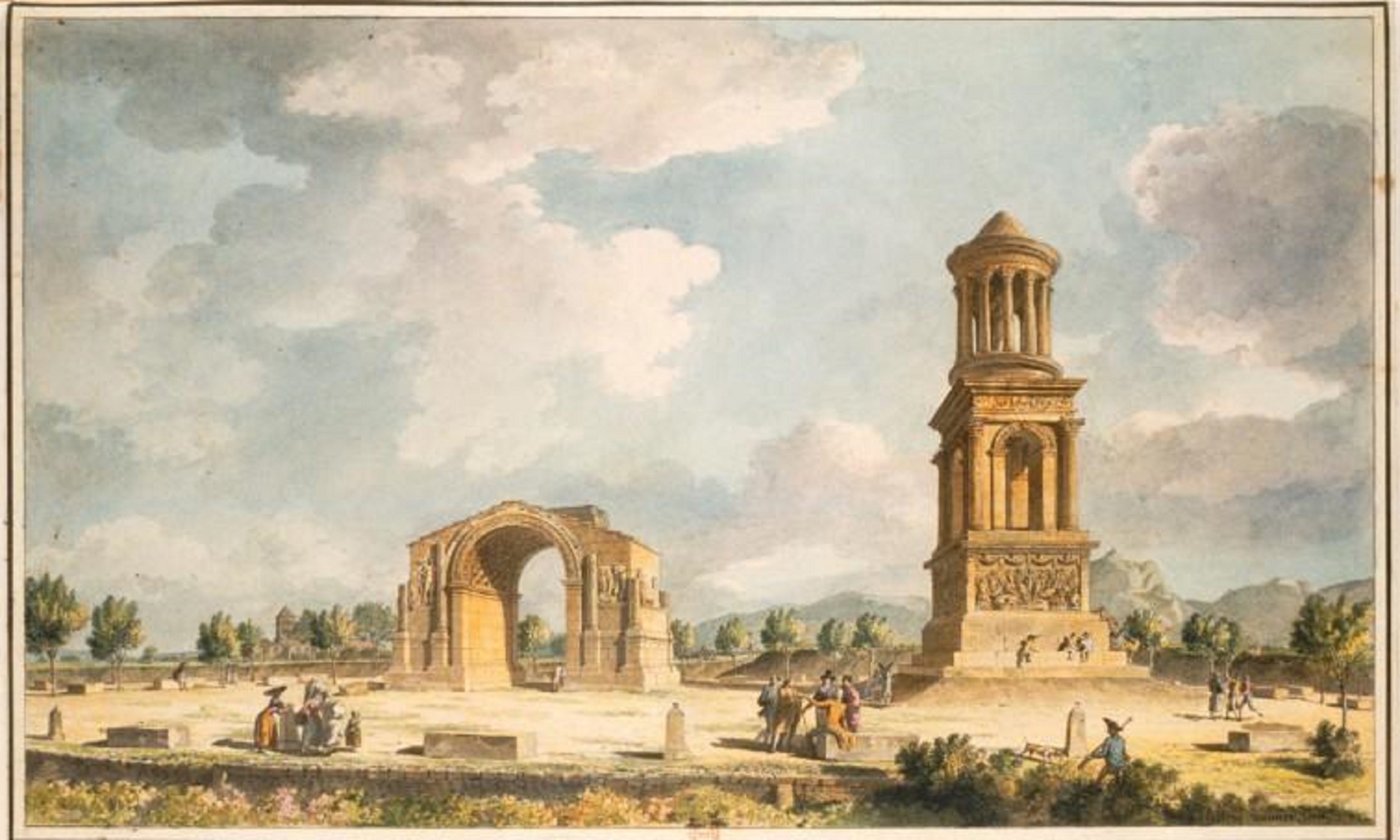 Dessin du plateau des antiquités à Saint-Rémy, de 1792